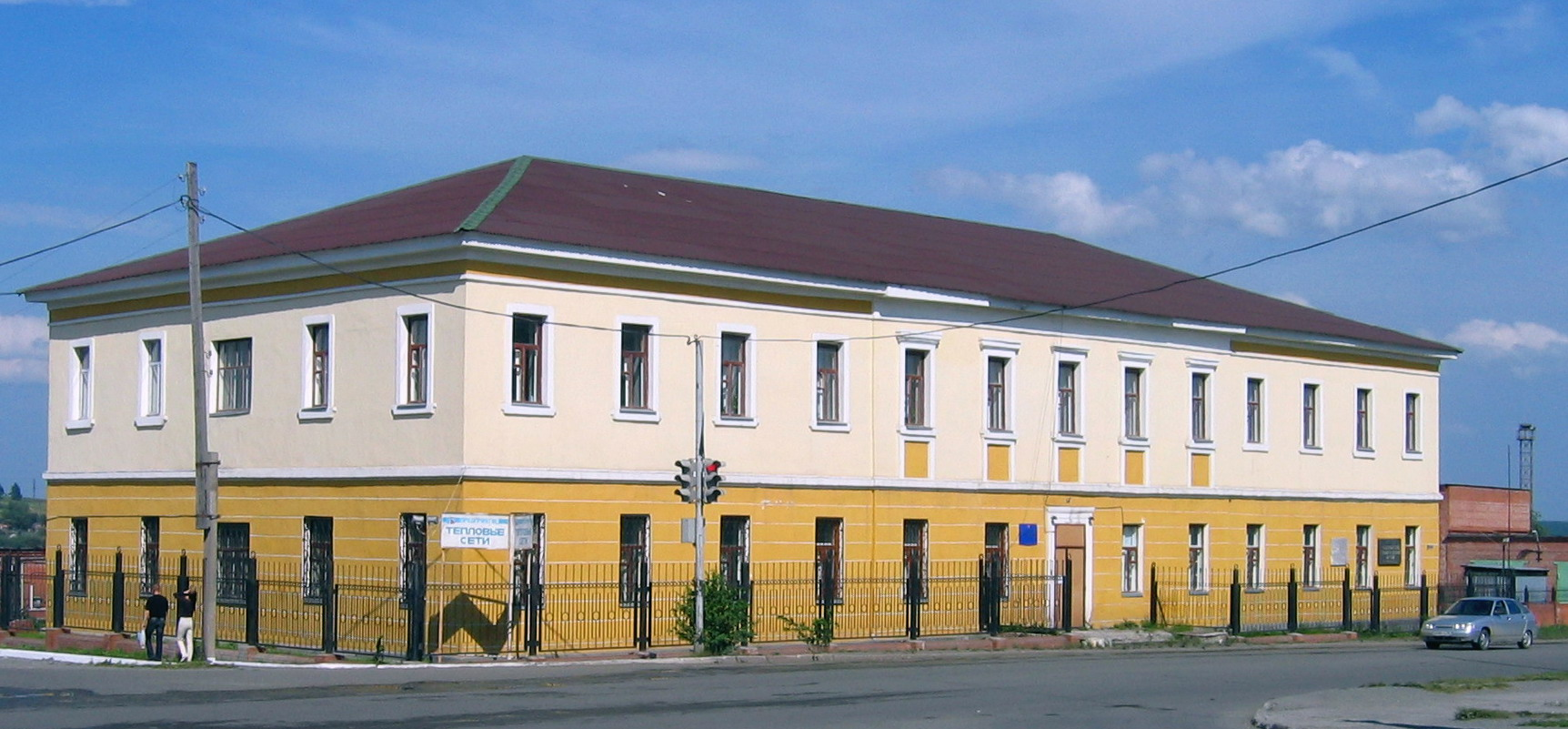 Фёдоровский геологический музей в Краснотурьинске (Свердловская область, Россия). Основан Евграфом Степановичом Фёдоровым в 1894 году.